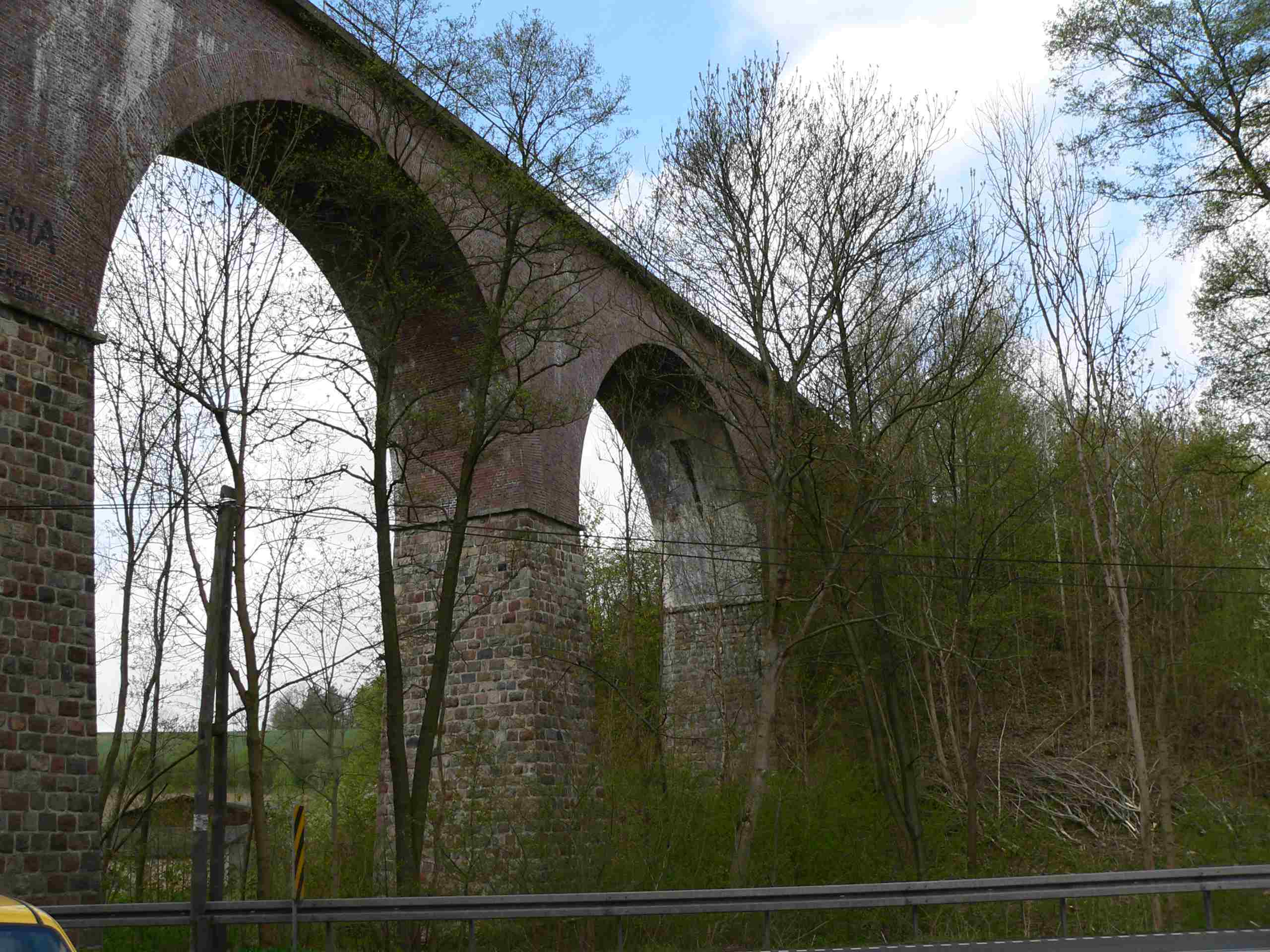 Buszkowo - most kolejowy nad rzeką Krówką, 1909